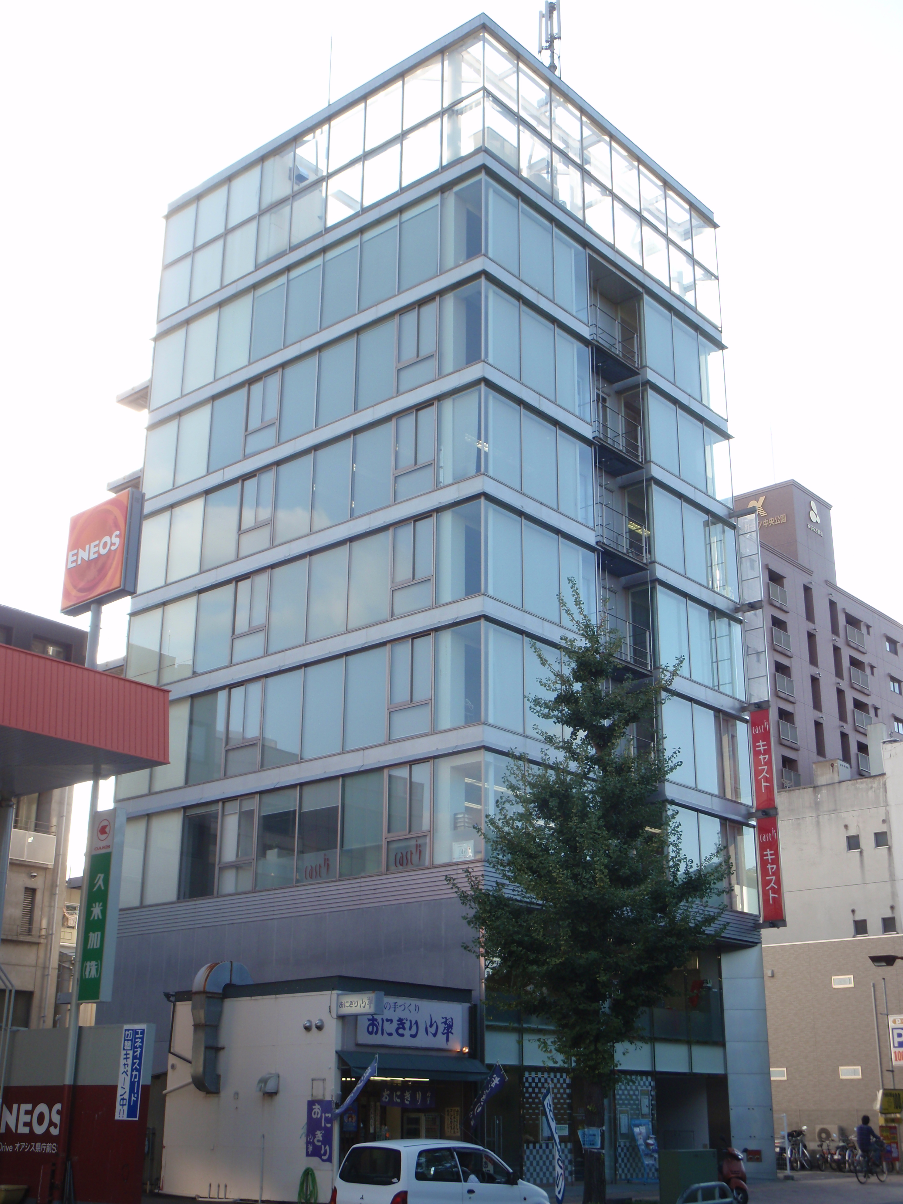 香川県高松市天神前にあるキャストKBSパートナーズの本社。